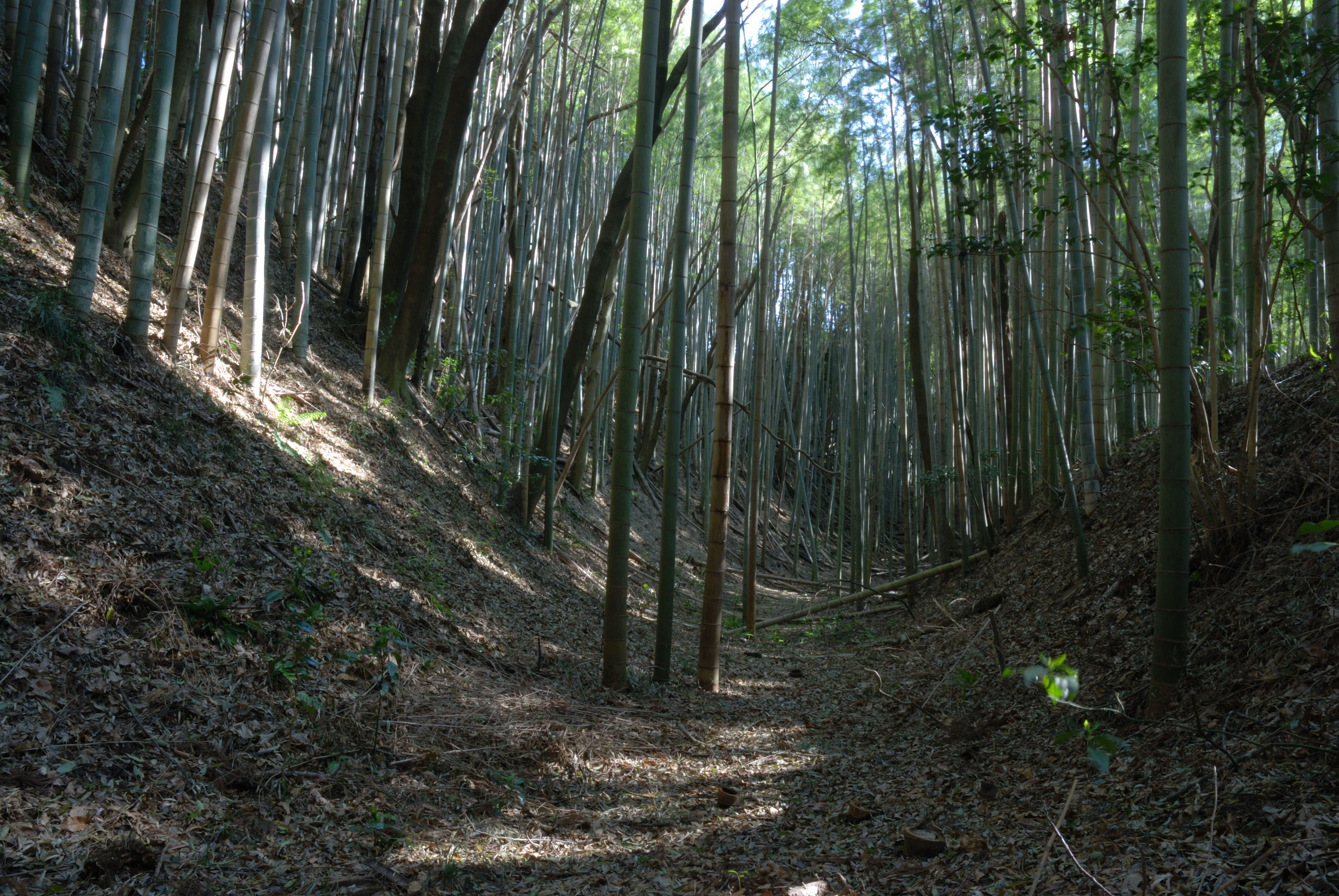 Ichikaku karabori